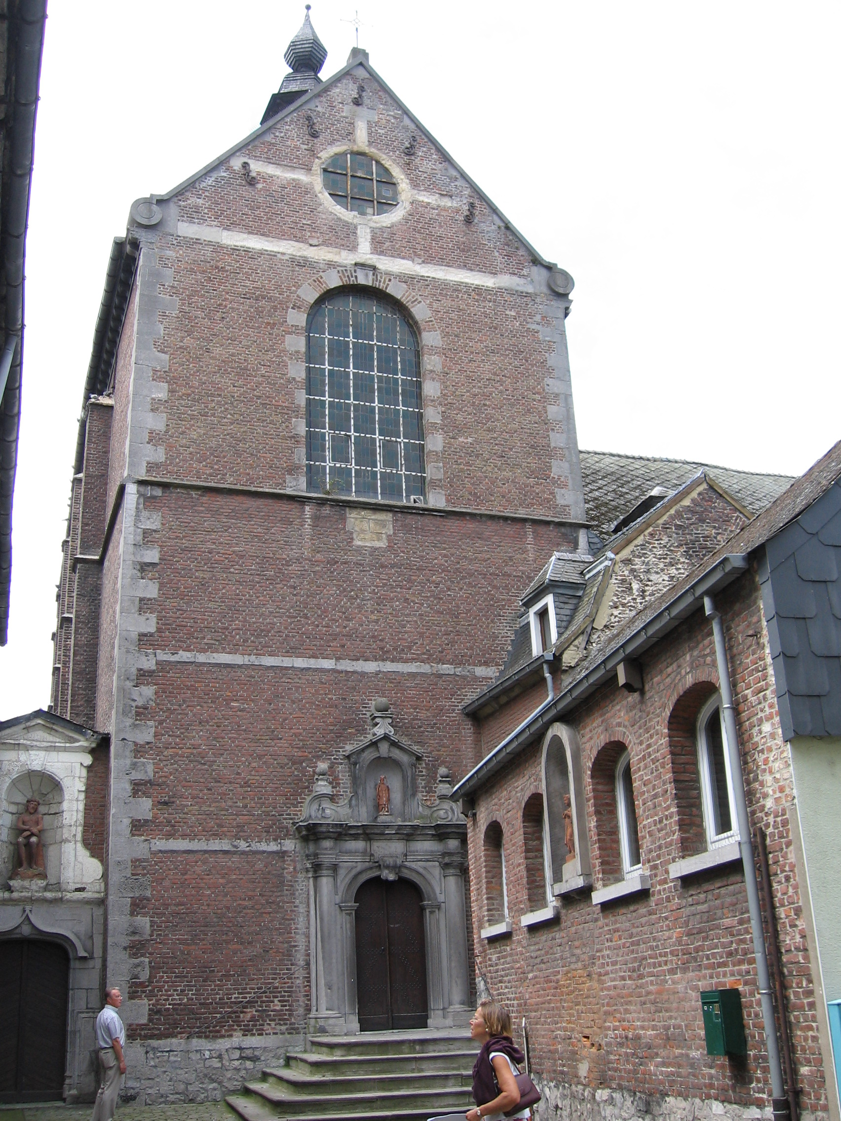 La chapelle du home Sainte-Elisabeth (à Saint-Ghislain) fut construite au XVIIe siècle pour l'hopital des soeurs augustiniennes. Elle renferme les reliques de Saint Ghislain.